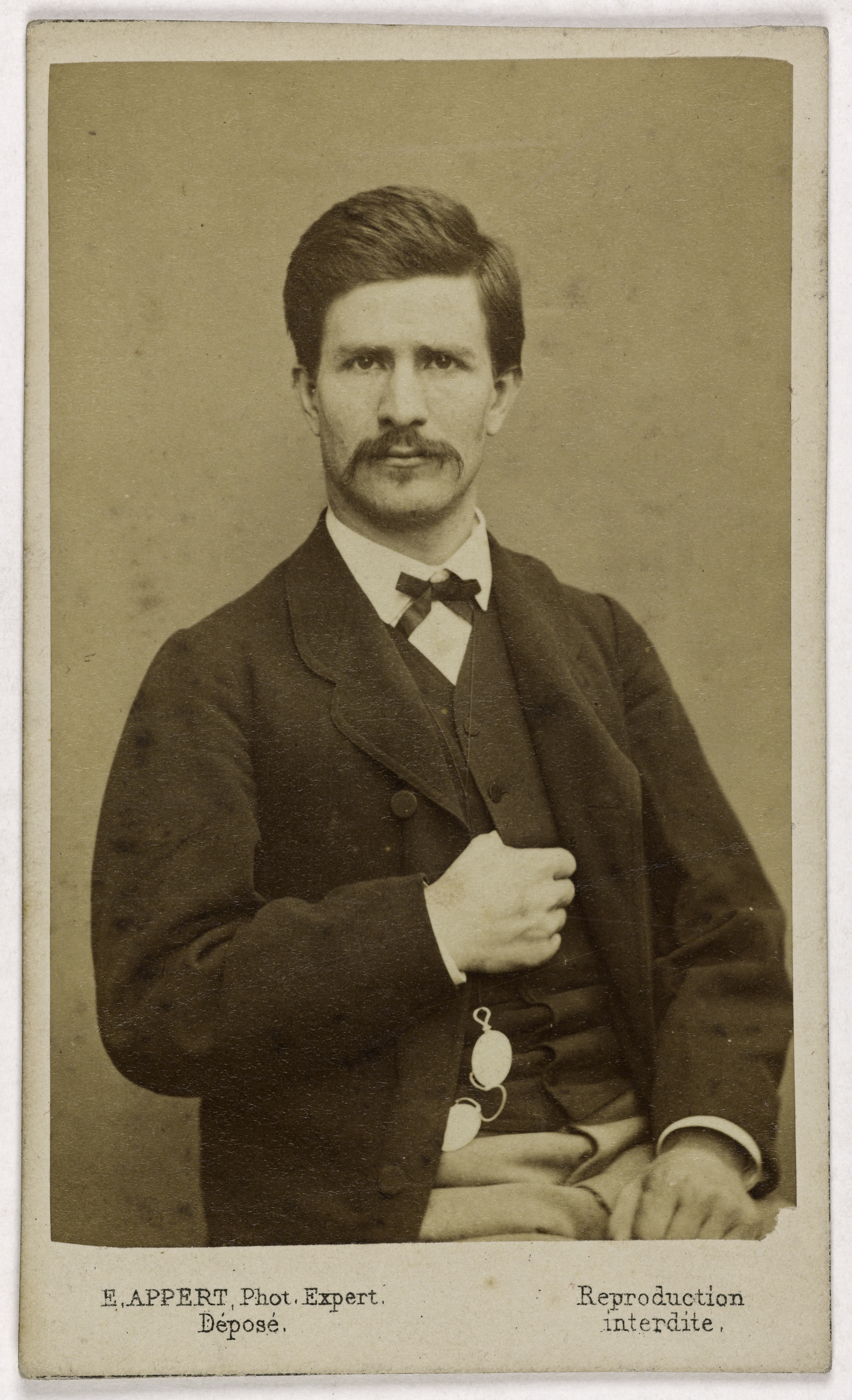 Louis-Nathaniel ROSSEL, Officier ayant rallié la Commune de Paris.